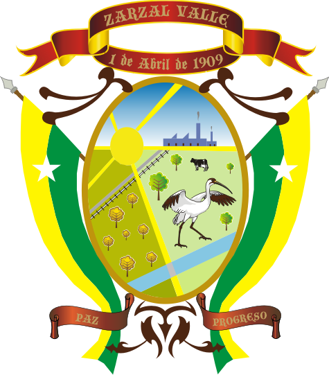 Escudo actualizado por el creador en su diseño.